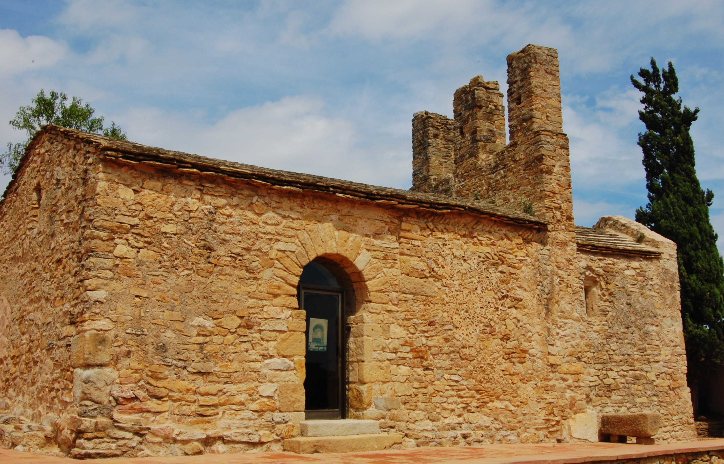 Ermita de Sant Julià de Boada (Palau-sator)